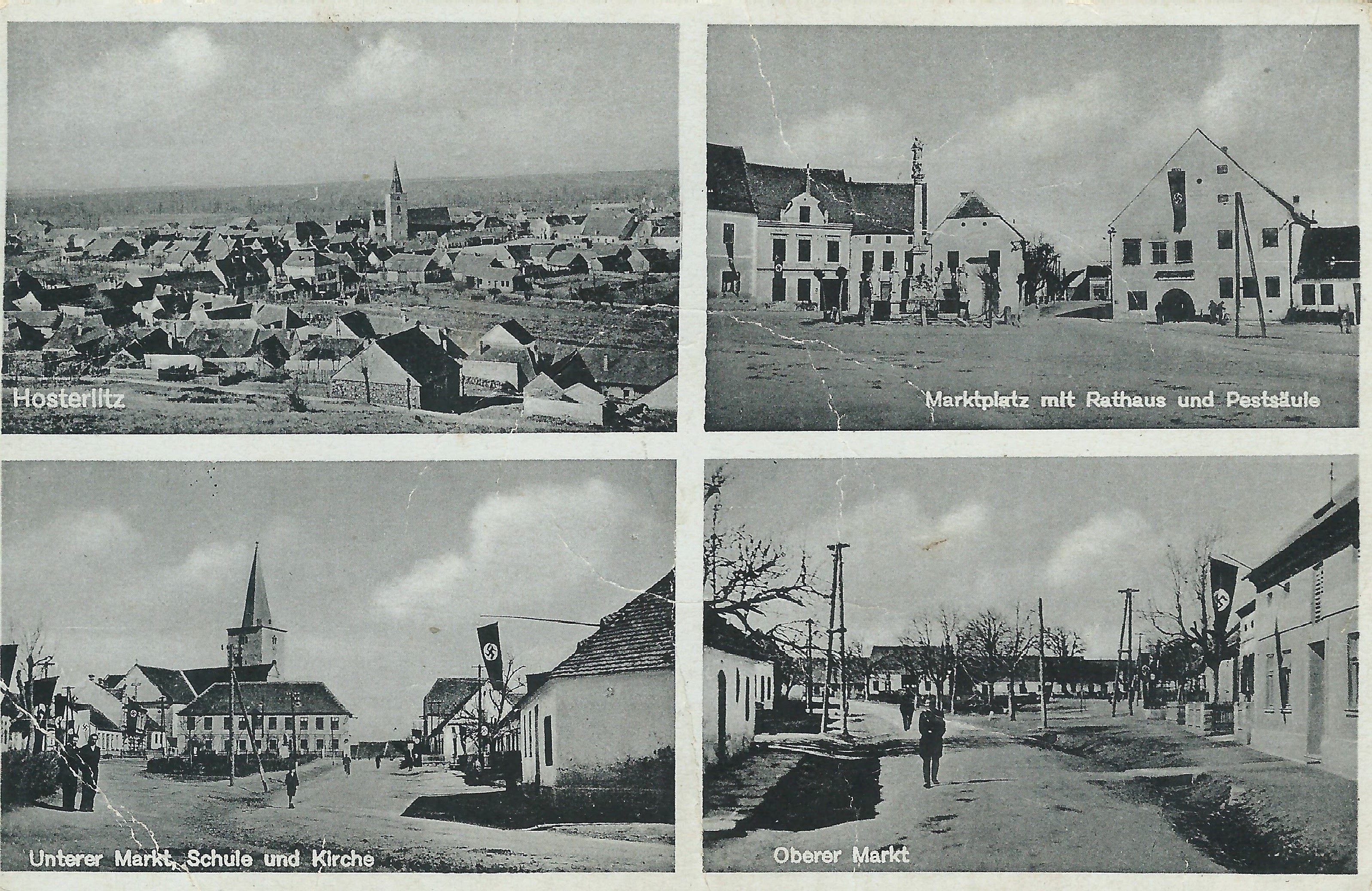 Ansichtskarte des Marktes Hosteradice im Jahr 1940 während des Nationalsozialismus